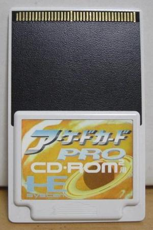 NECホームエレクトロニクス、アーケードカードPRO Category:ゲーム機画像 Category:PCエンジン